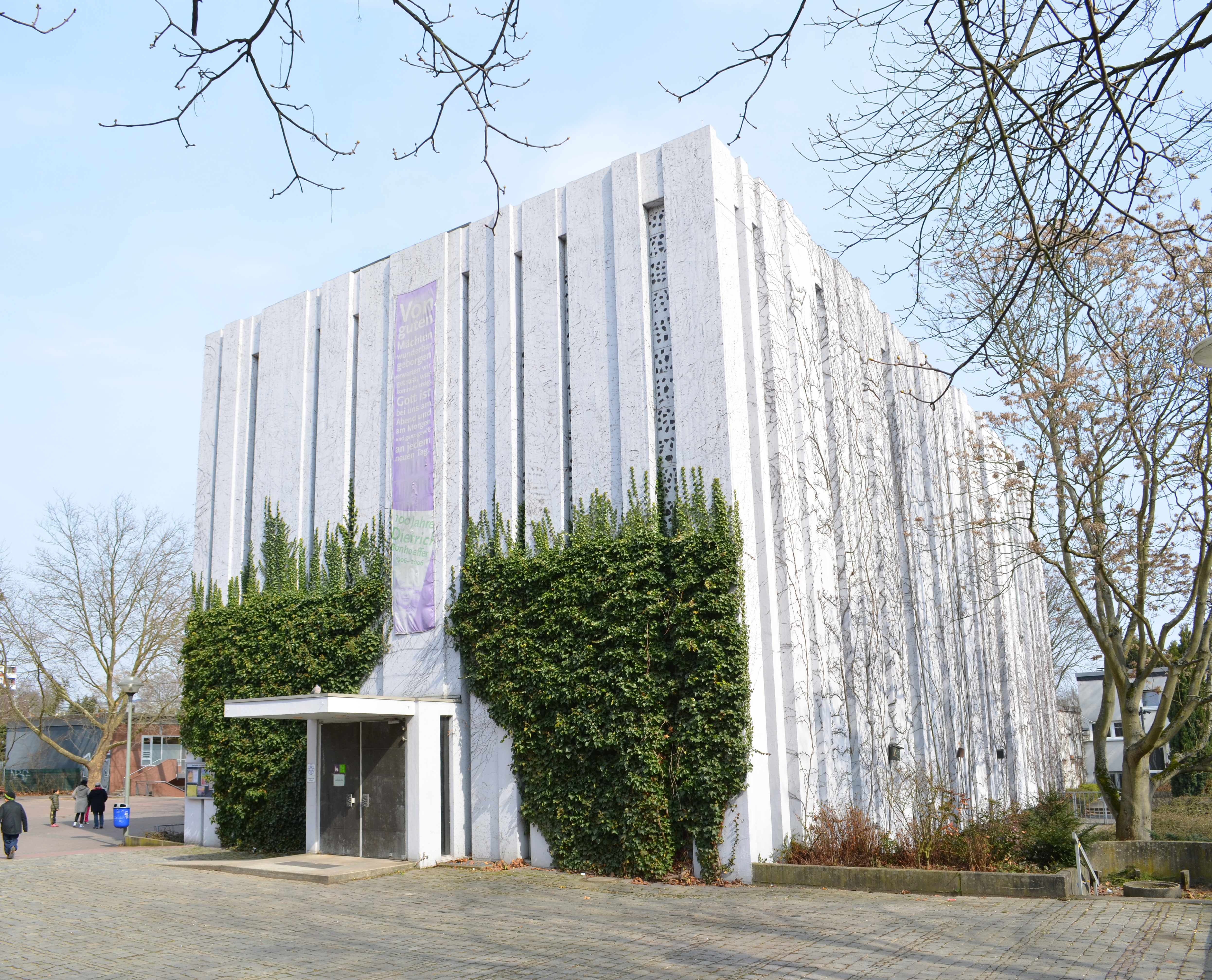 Niederursel, Dietrich Bonhöfer-Gemeinde